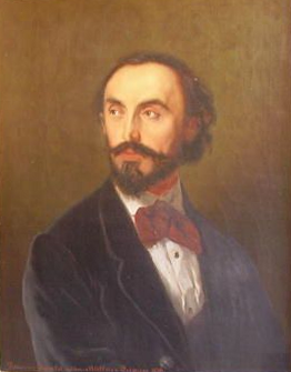 Klimkovics Béla magyar festőművész.